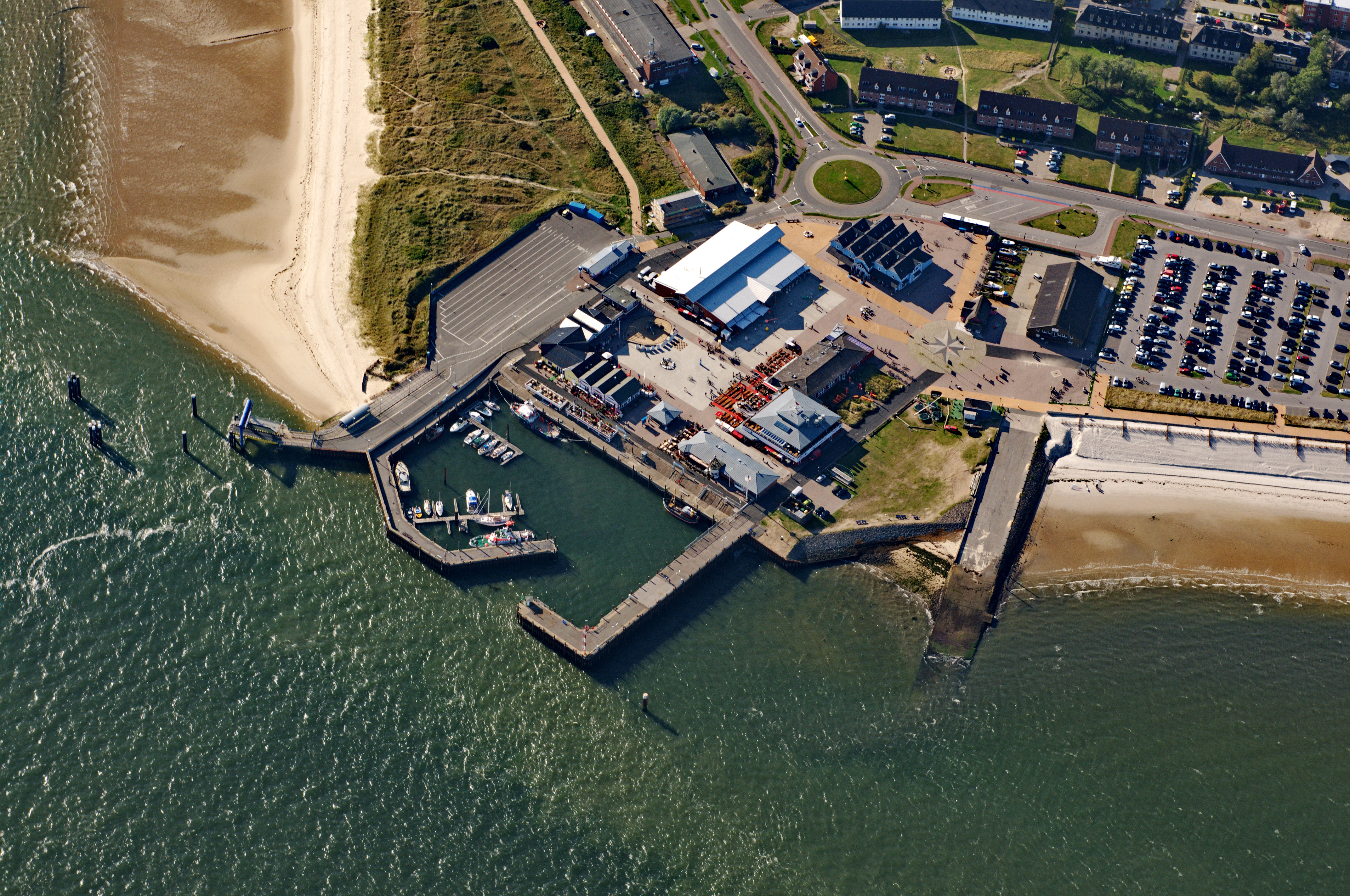 Fotoflug über das nordfriesische Wattenmeer. List auf Sylt, Fähranleger List Havneby (Dänemark) und Marina.